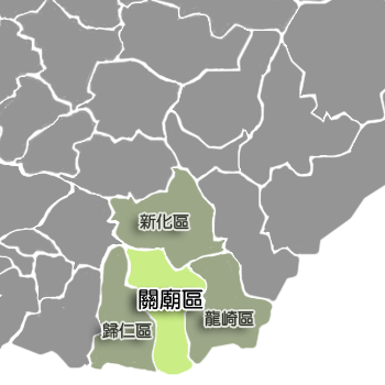 關廟區相對位置